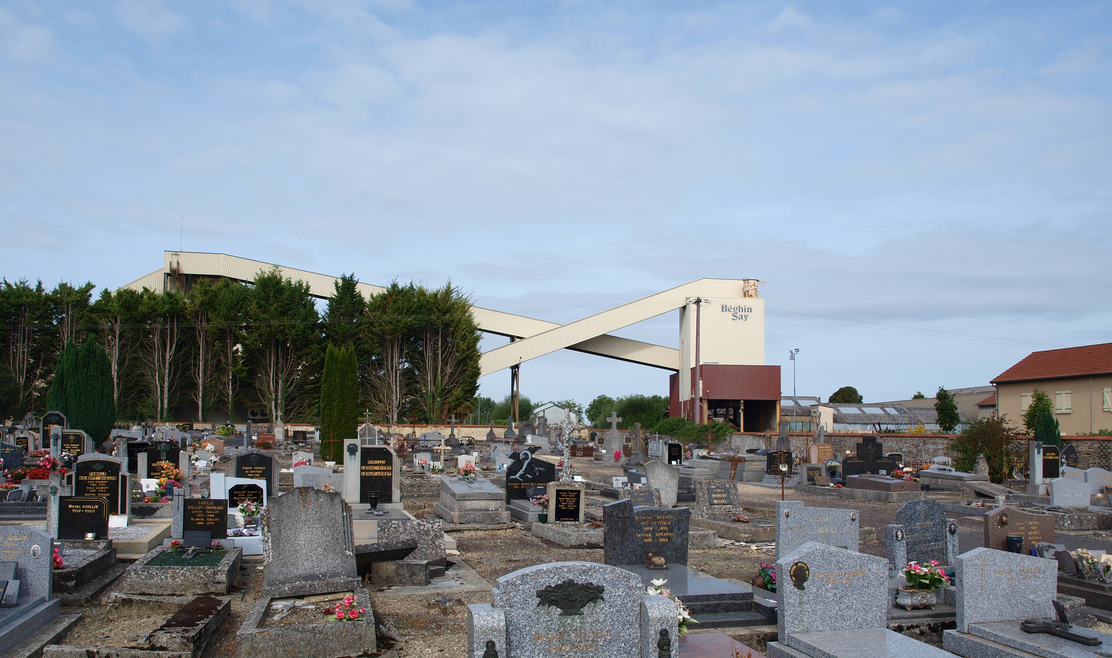 Attigny (Ardennes, France) ; feue la sucrerie Béghin-Say